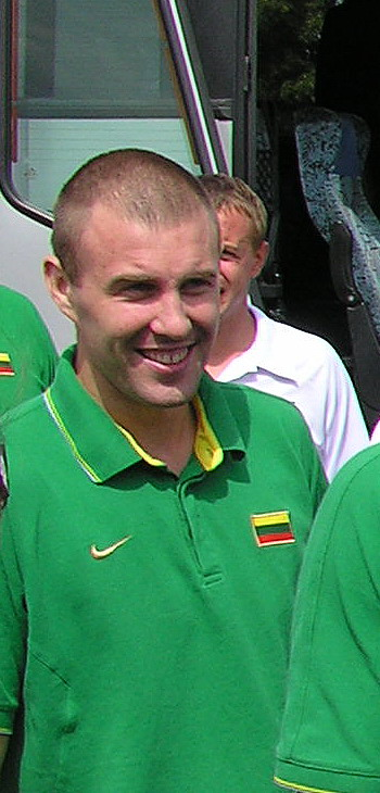 Tomas Delininkaitis, Nacionalinės vyrų krepšinio rinktinės susitikimo Mažeikiuose metu 2009 m. liepos 31 d.